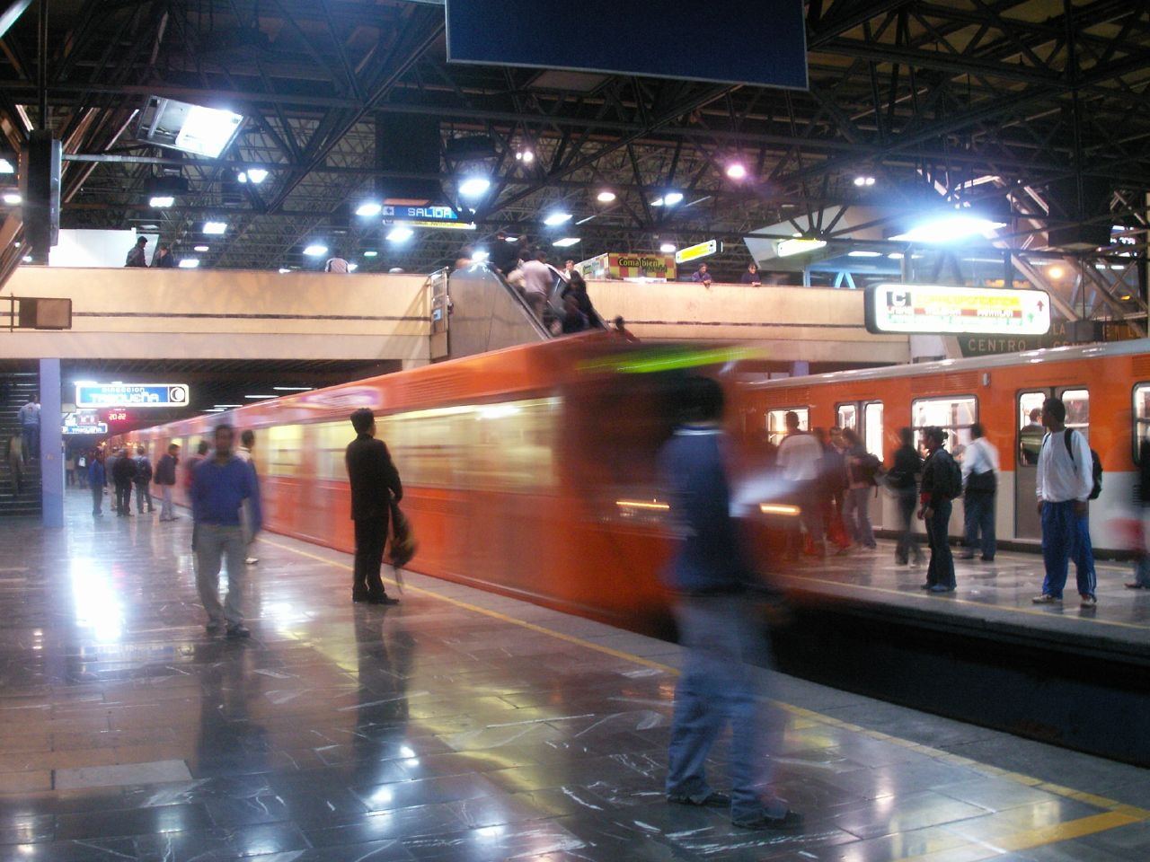 Metro Chabacano, Mexico City